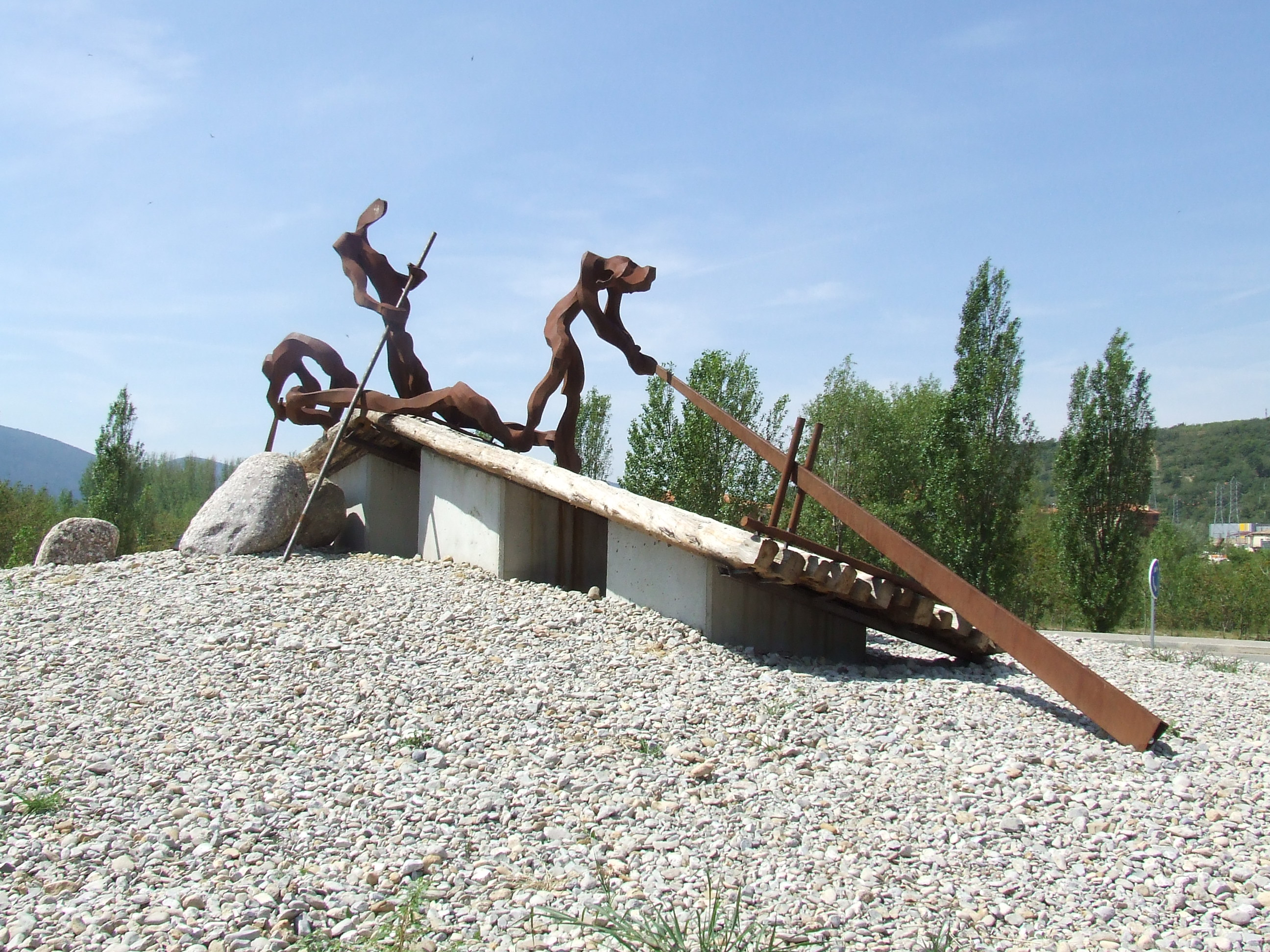 Monument als raiers, a la Pobla de Segur (Pallars Jussà), obra d'Anselm Cabús y Torra, 2007.